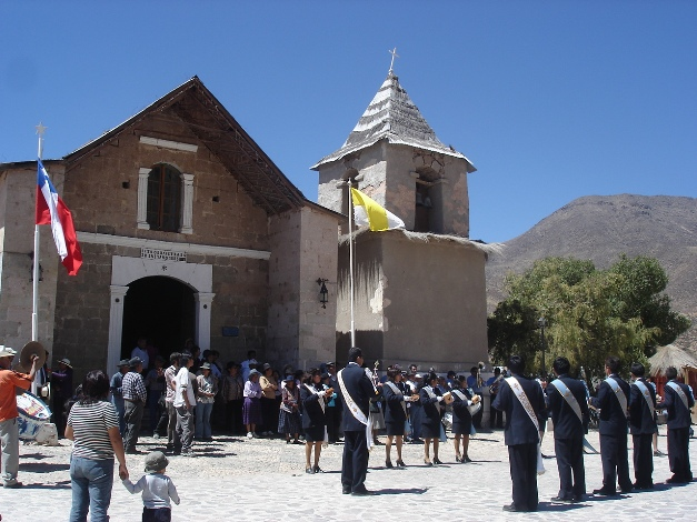 fiesta de san Francisco de Asis del año 2006